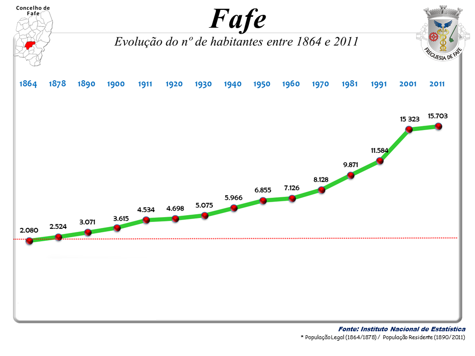 Censos 1864/2011